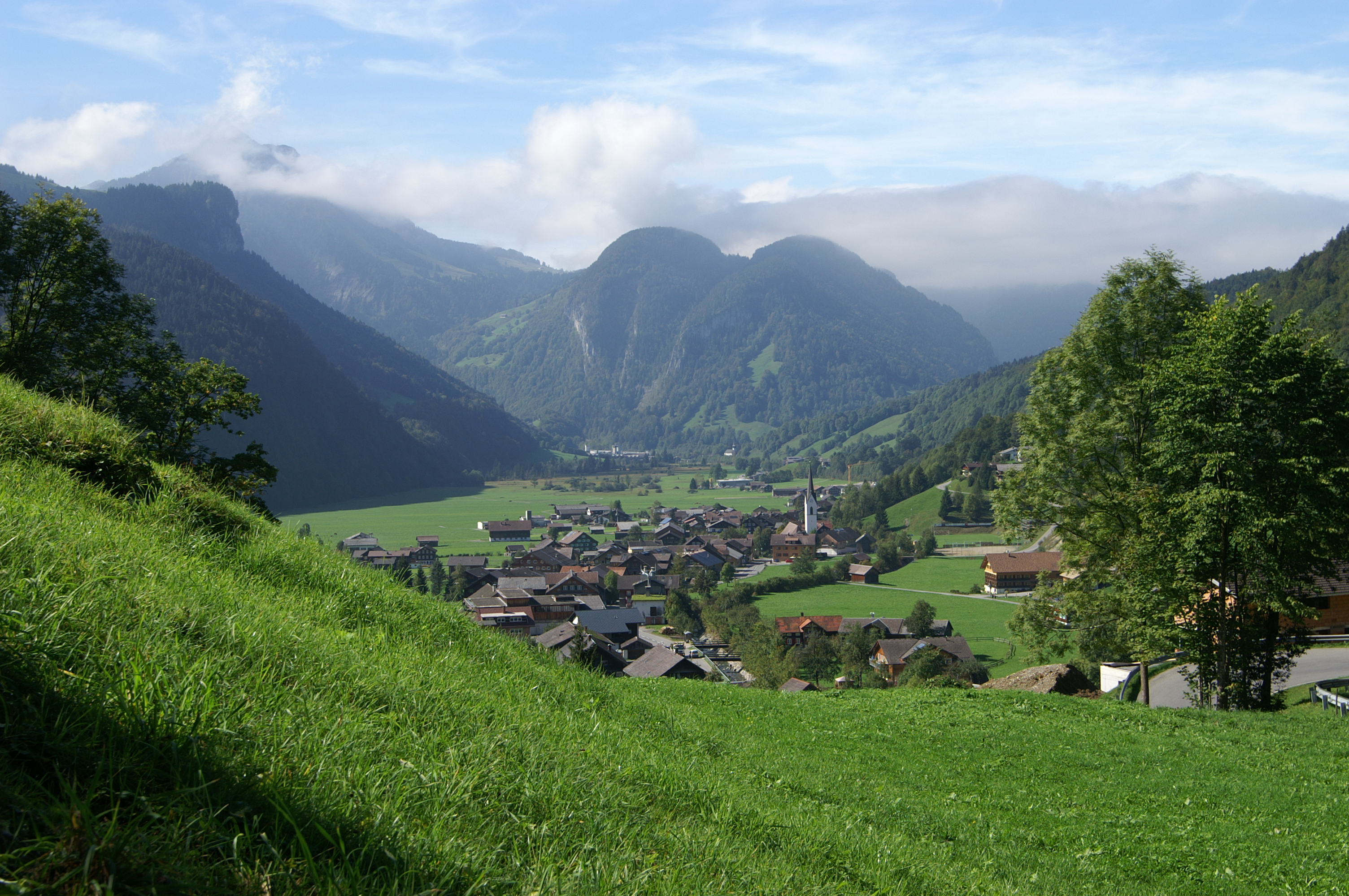 Gemeinde Bizau im Bregenzerwald , Vorarlberg